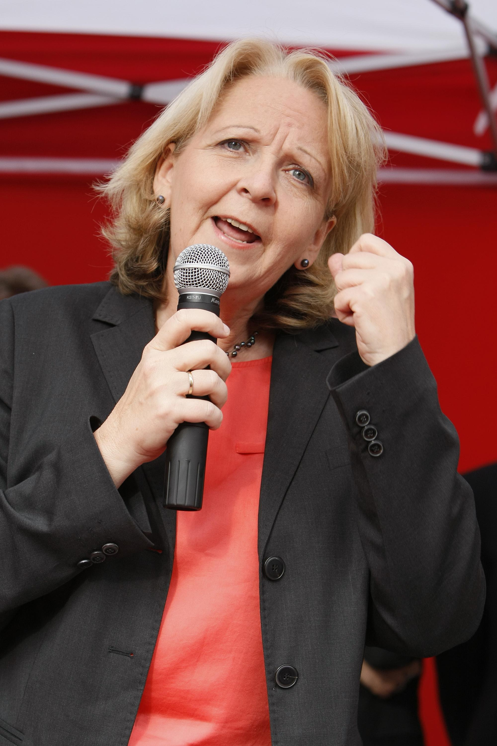 Hannelore Kraft am 09.05.2012 in Hamm